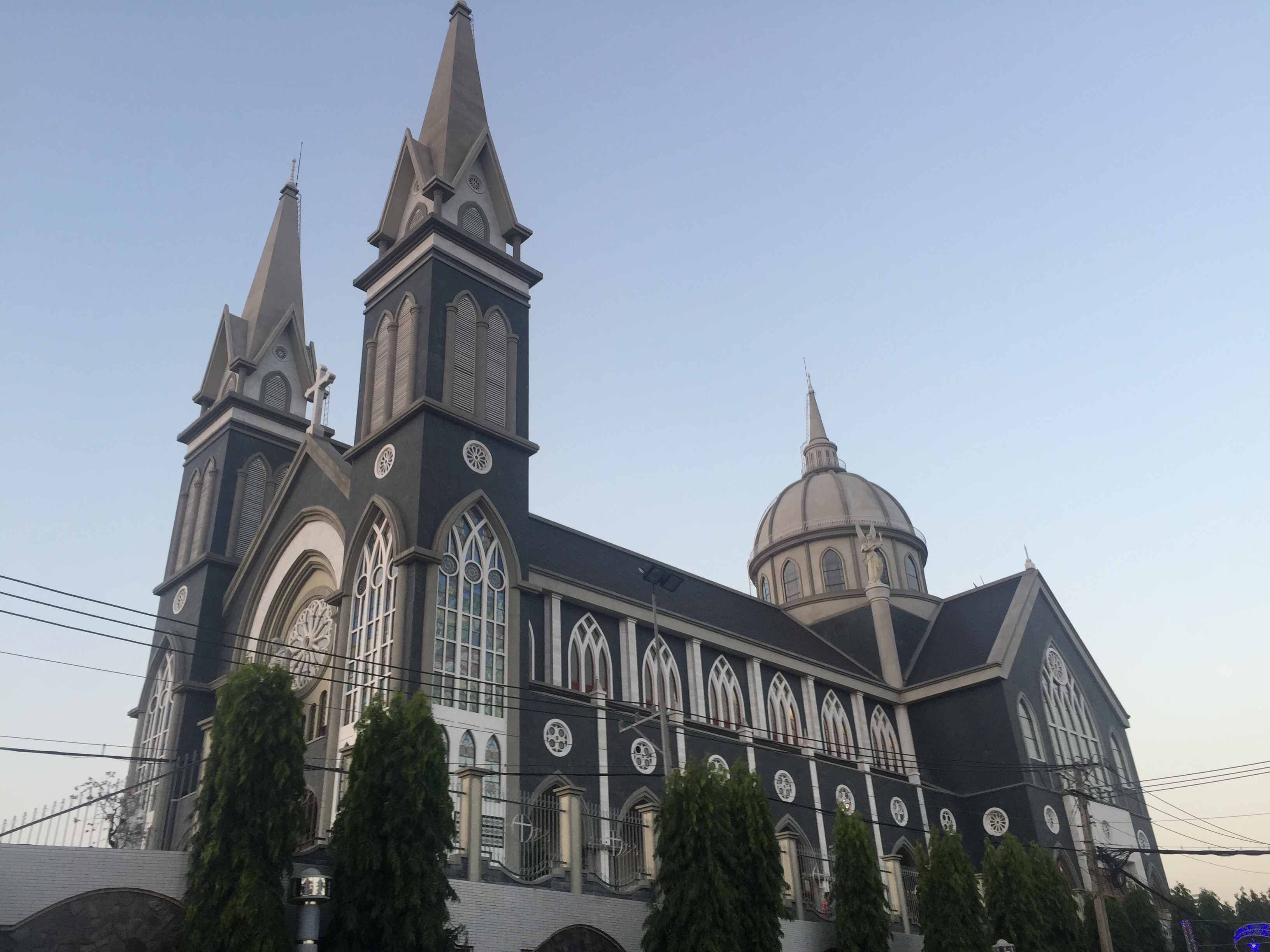 Nha tho Chanh toa Phu cuong- binh duong-Phú Cường, tp. Thủ Dầu Một, Bình Dương, Việt Nam